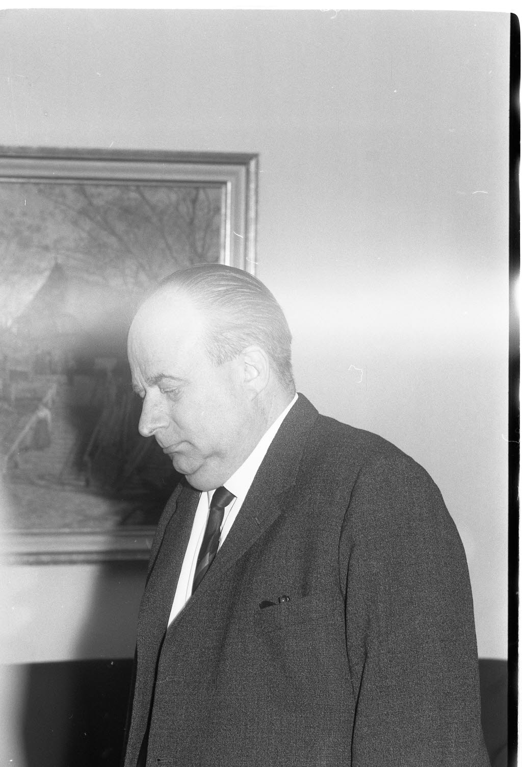 Bundesverdienstkreuz für den Geschäftsführer des Kreisverbandes Kiel des Deutschen Gewerkschaftsbundes (DGB) Bruno Verdieck